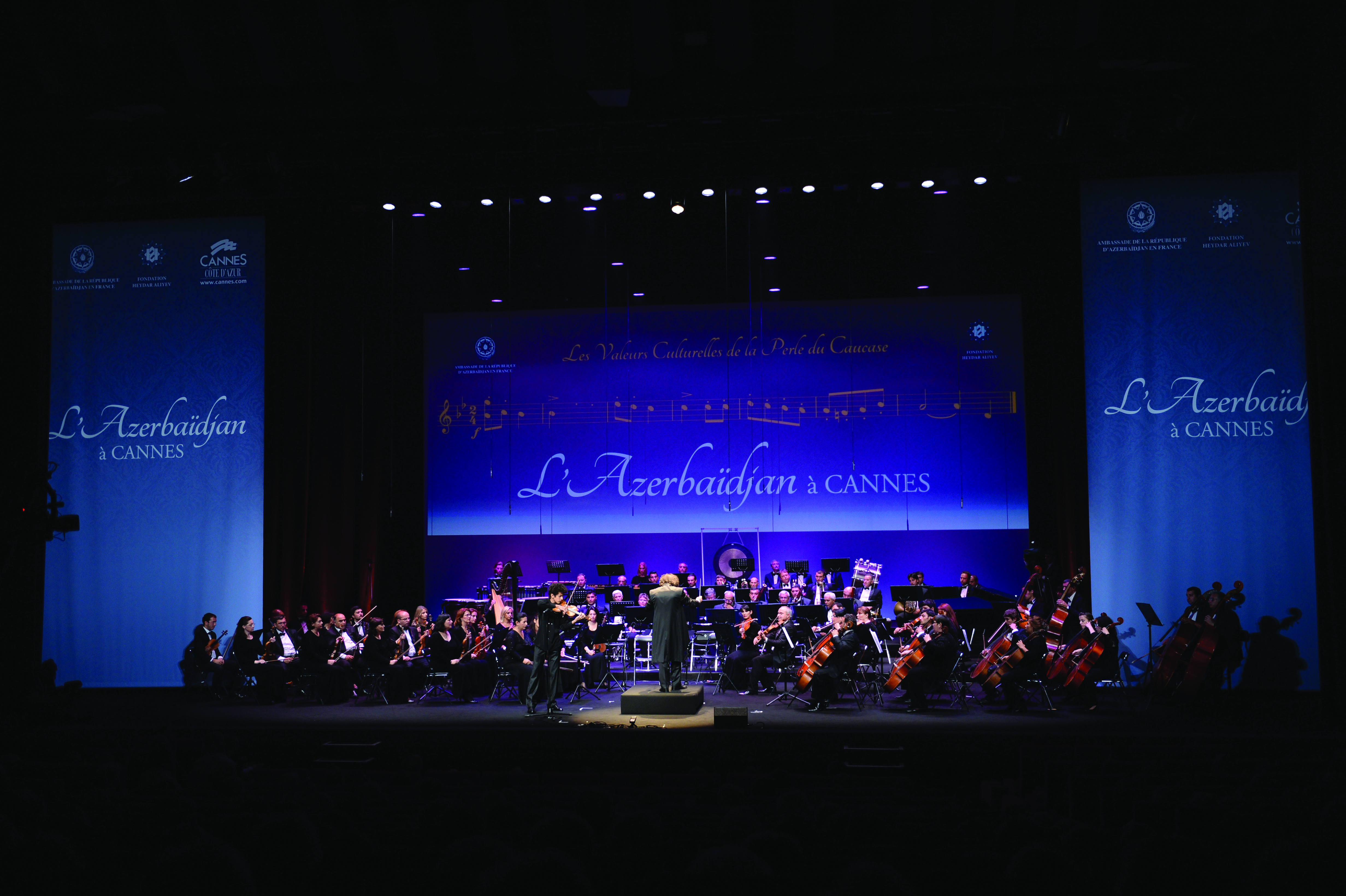 Kannda Azərbaycan mədəniyyəti günləri çərçivəsində klassik musiqi gecəsi